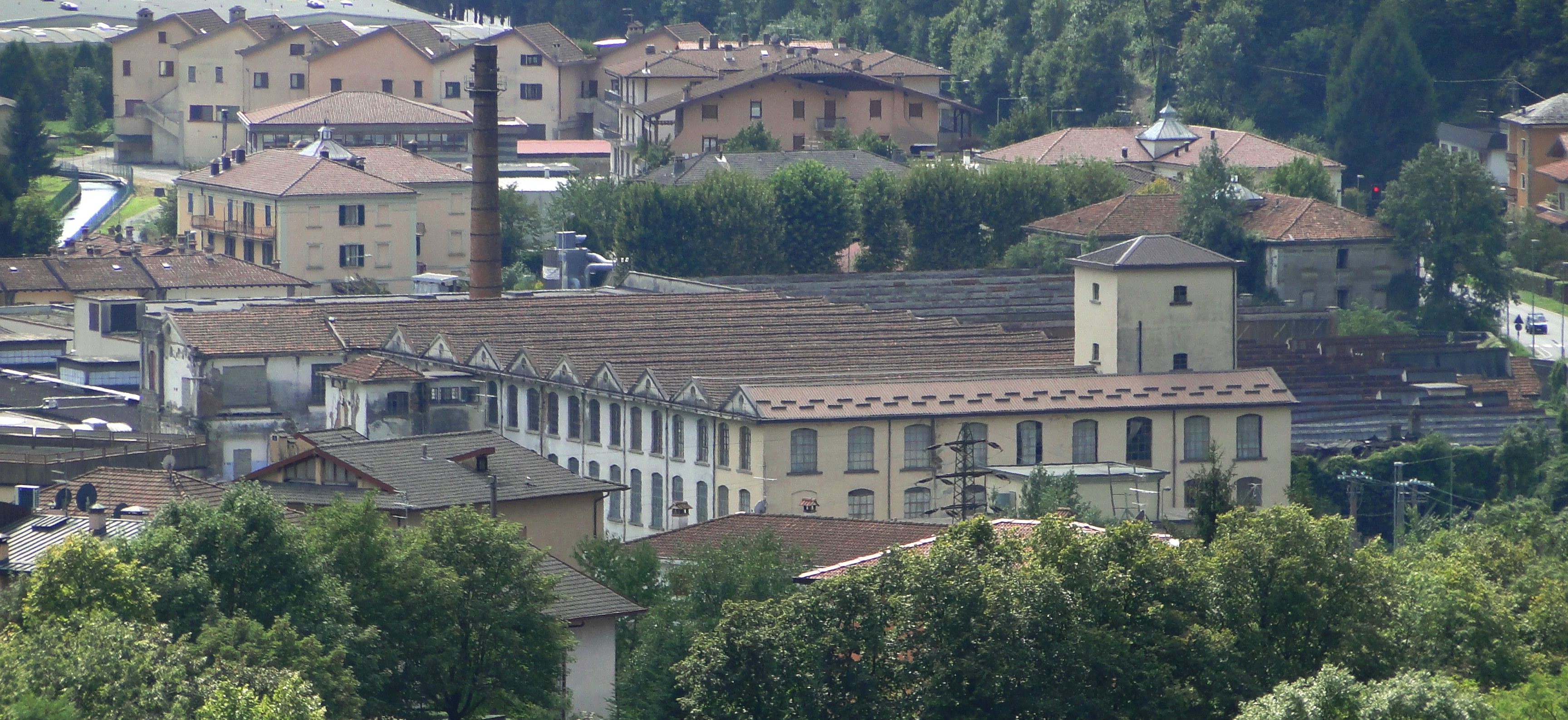 Villa d'Ogna (BG). Complesso industrial Festi-Rasini